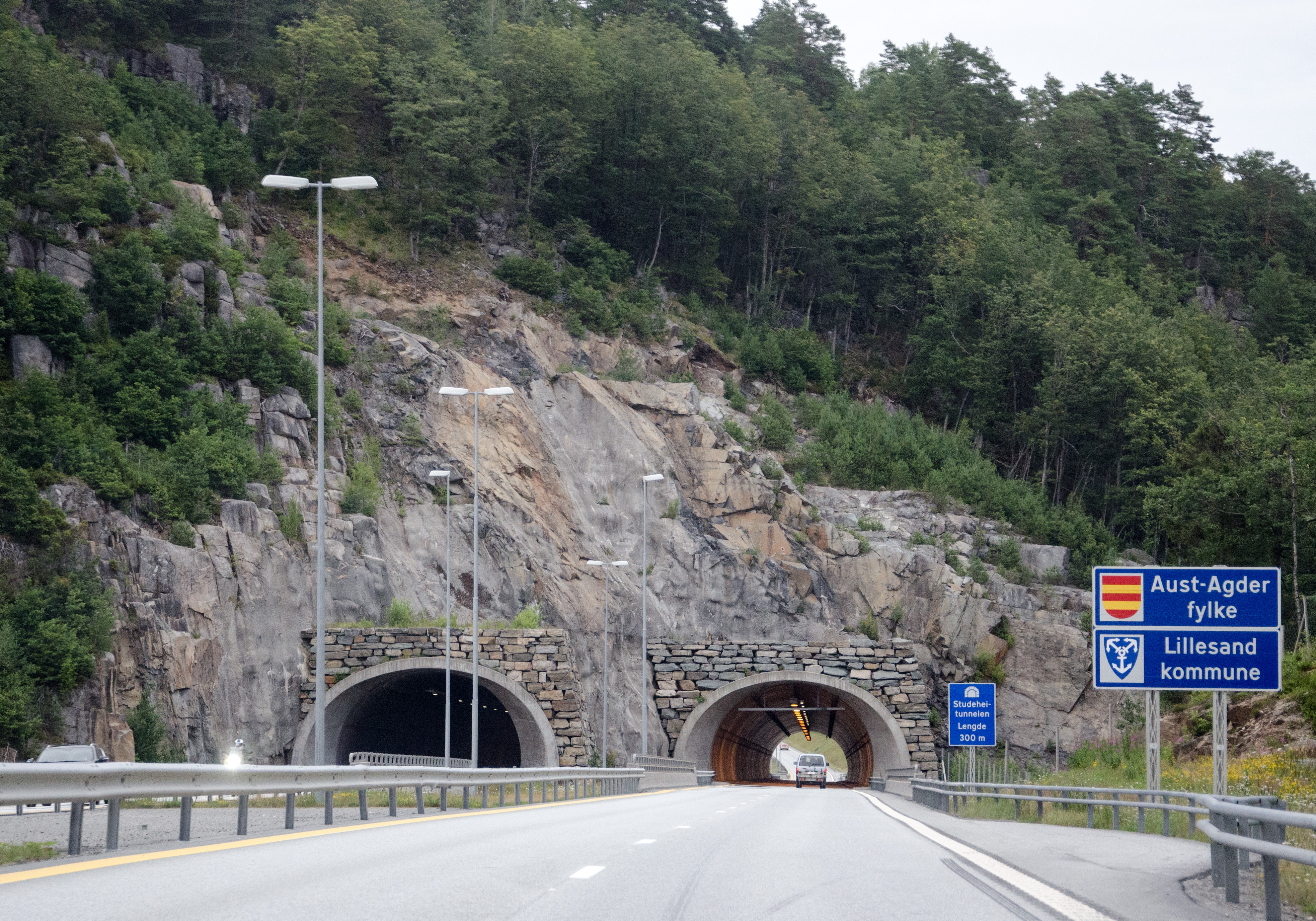 Studeheitunnelen på E18